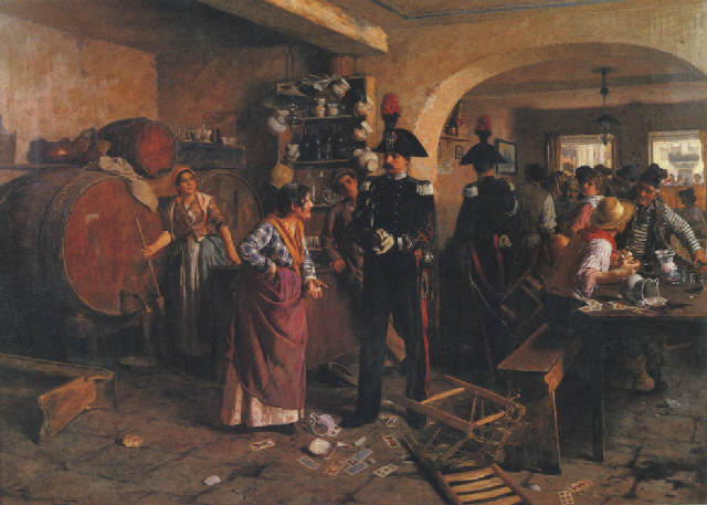 Giuseppe Barison : Dopo una rissa